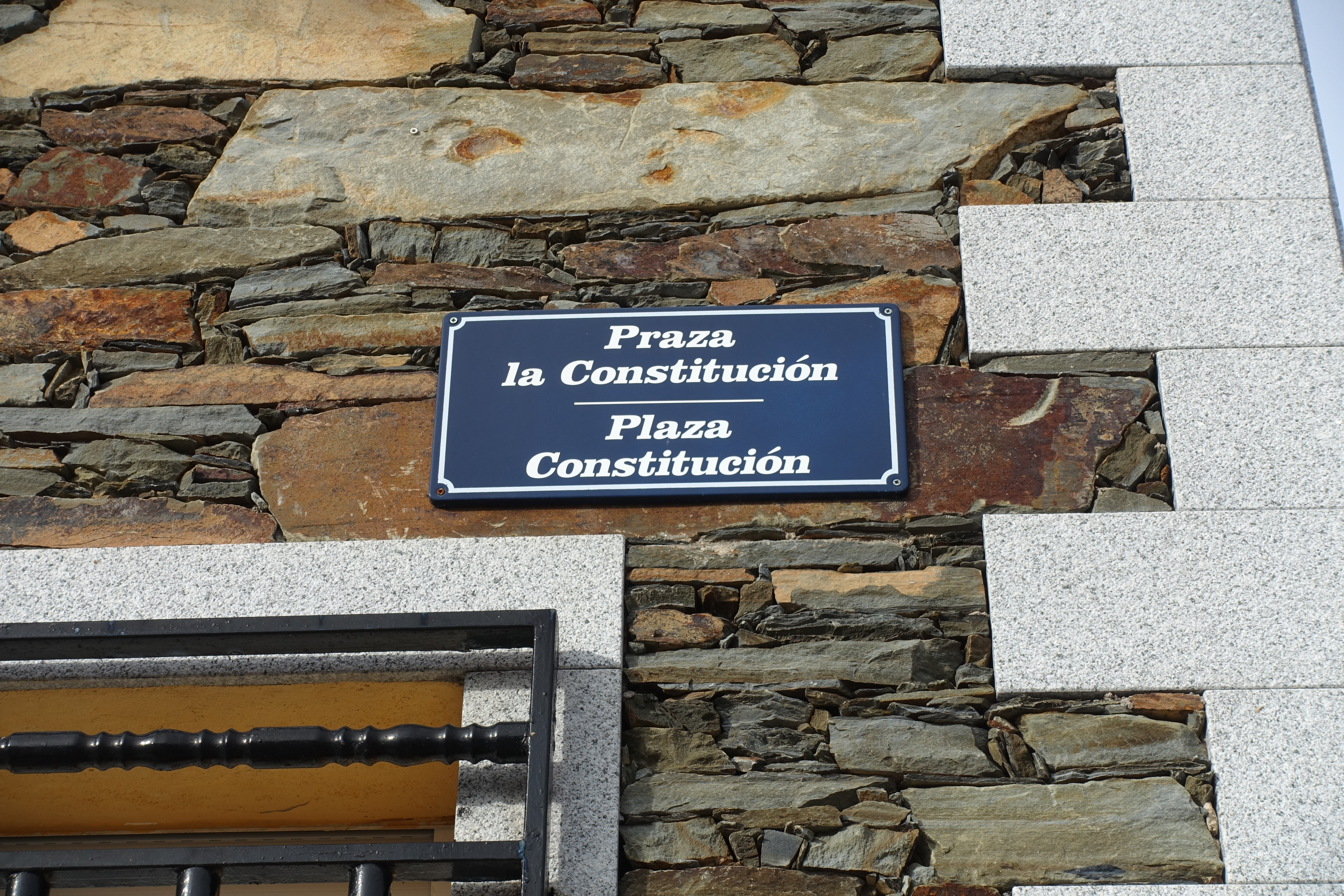 Placa bilingüe en la plaza Constitución de Robleda (Salamanca, España).